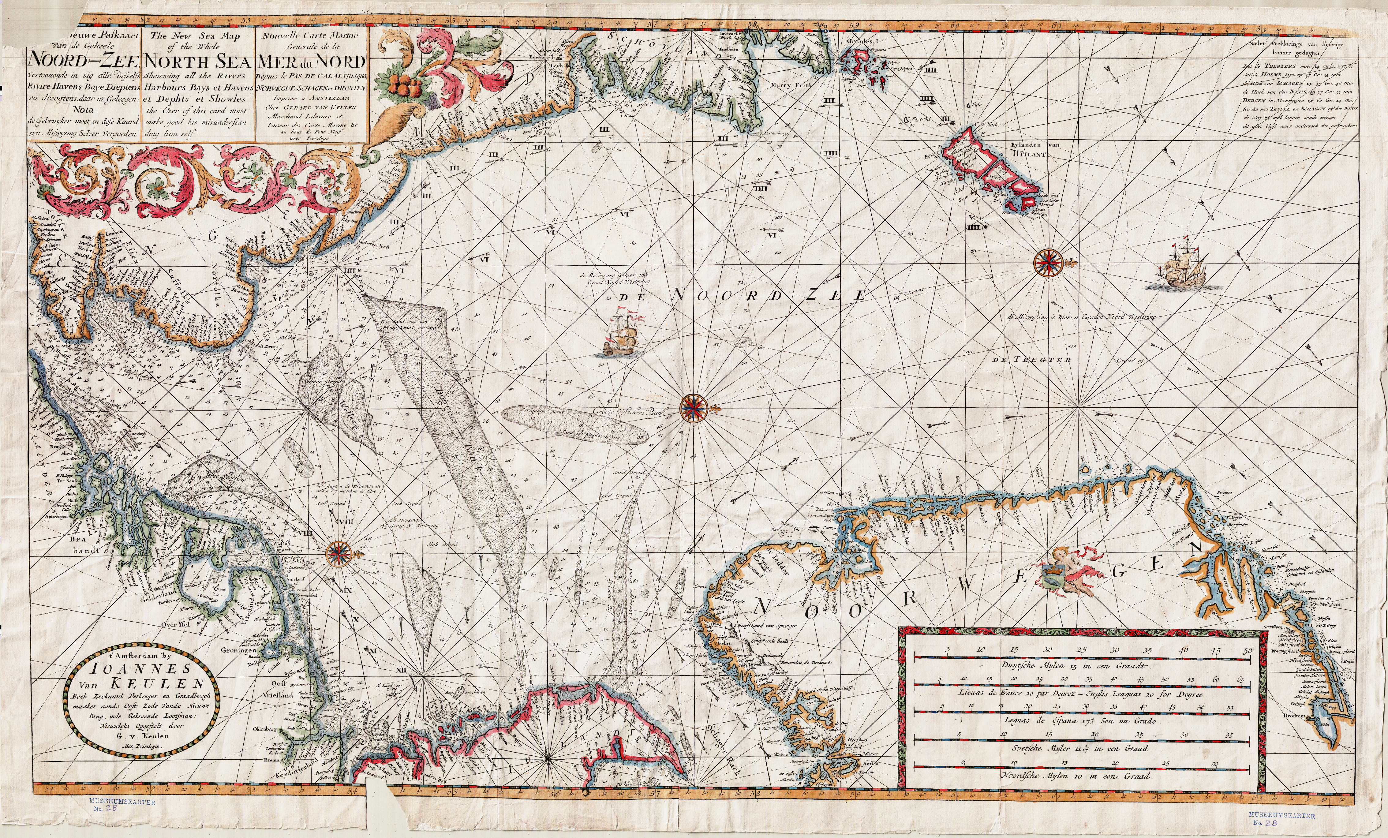 Sjøkart over Nordsjøen, fra ukjent årstall. Håndtegnet av Ioannes van Keulen i omtrenlig målestokk 1:1000 0000. Original kartstørrelse ca 105 x 63 cm. Et eksemplar befinner seg hos Statens kartverk Sjø i Stavanger.